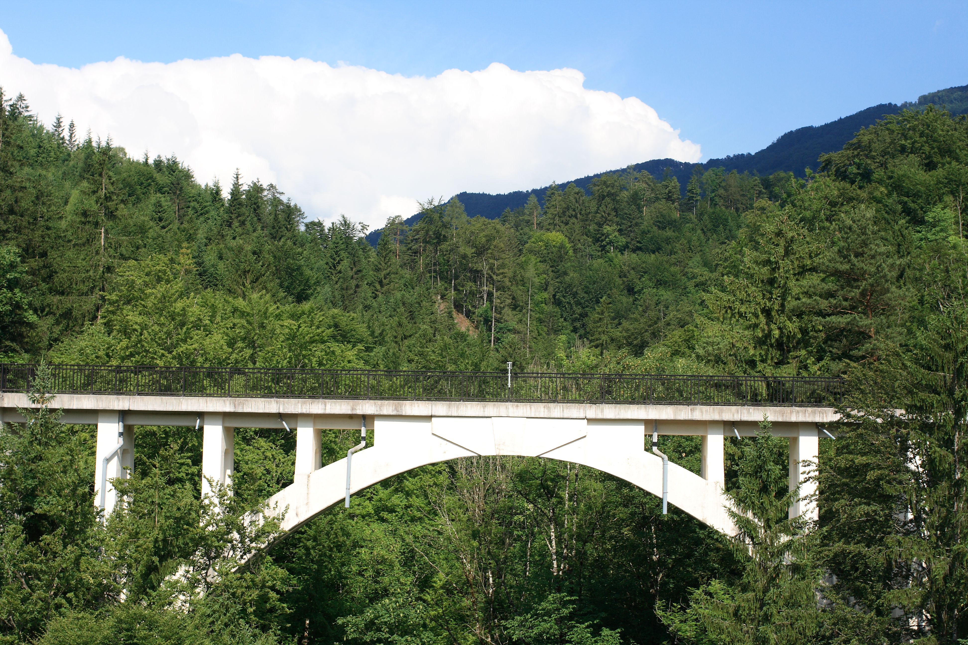 Die Tiefengrabenbrücke bei Steyrdurchbruch (Oberösterreich). Die Gemeindegrenze von Micheldorf (links) und Grünburg (rechts) verläuft genau in der Mitte